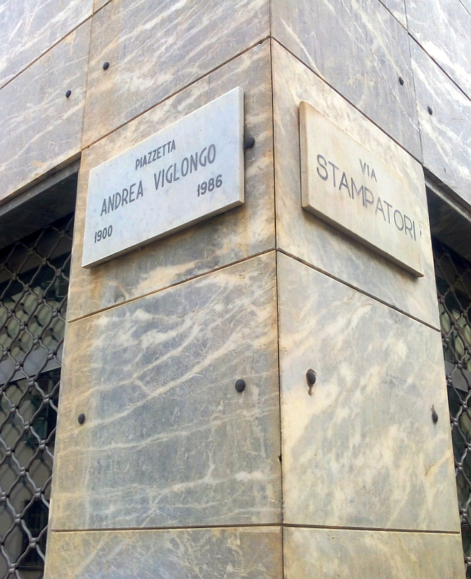 Piazzetta Andrea Viglongo angolo via Stampatori (Torino)